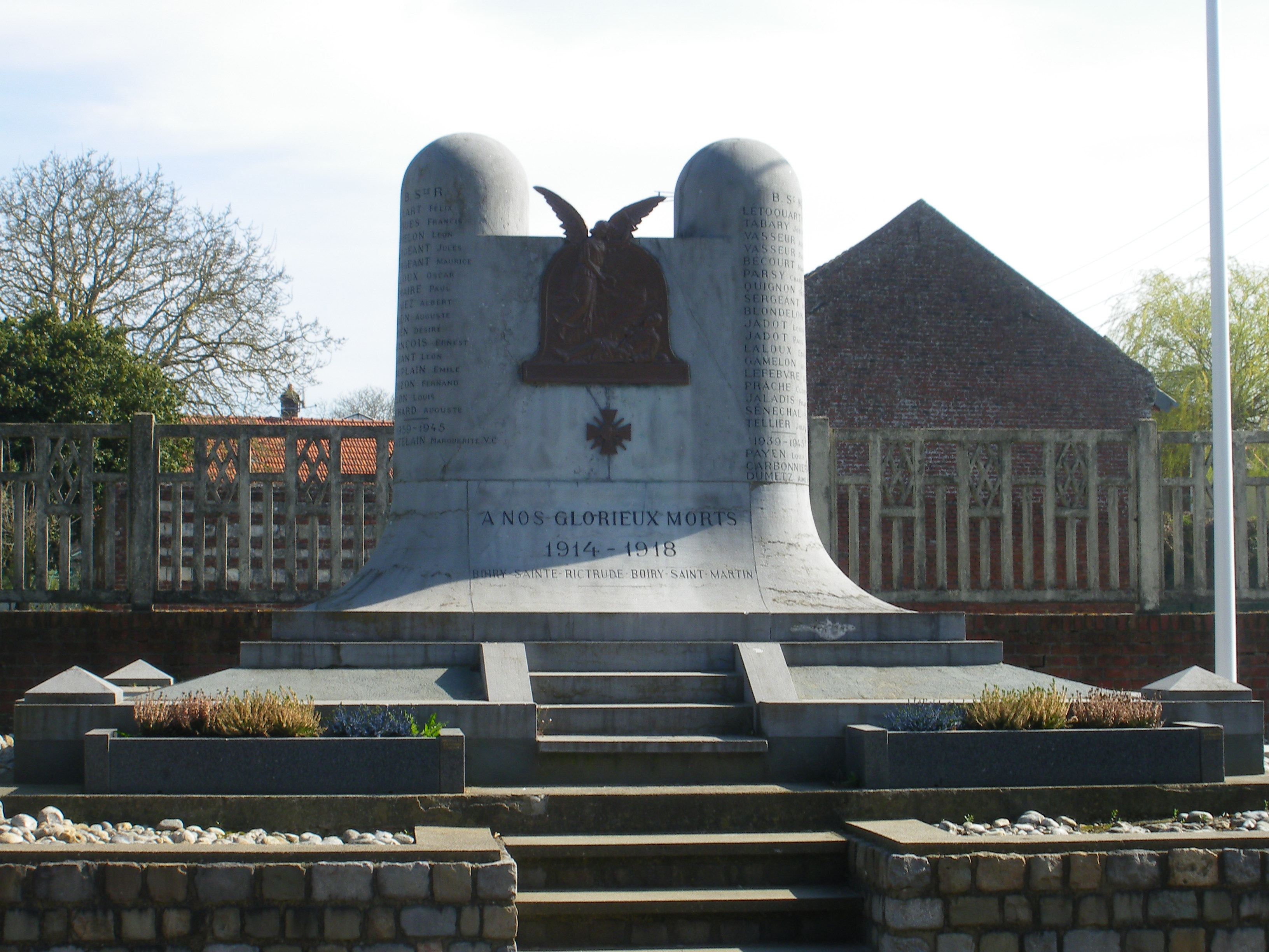 Monument aux morts commun aux communes de Boiry-Saint-Martin et Boiry-Sainte-Rictrude